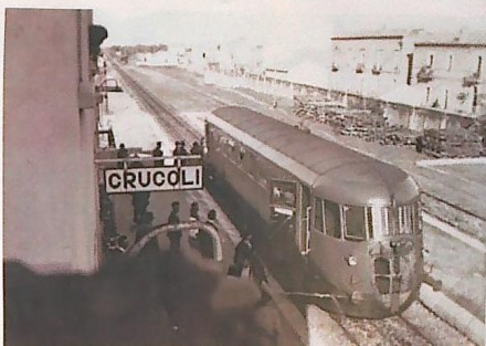 Una littorina e i viaggiatori pronti a partire dalla Stazione di Crucoli